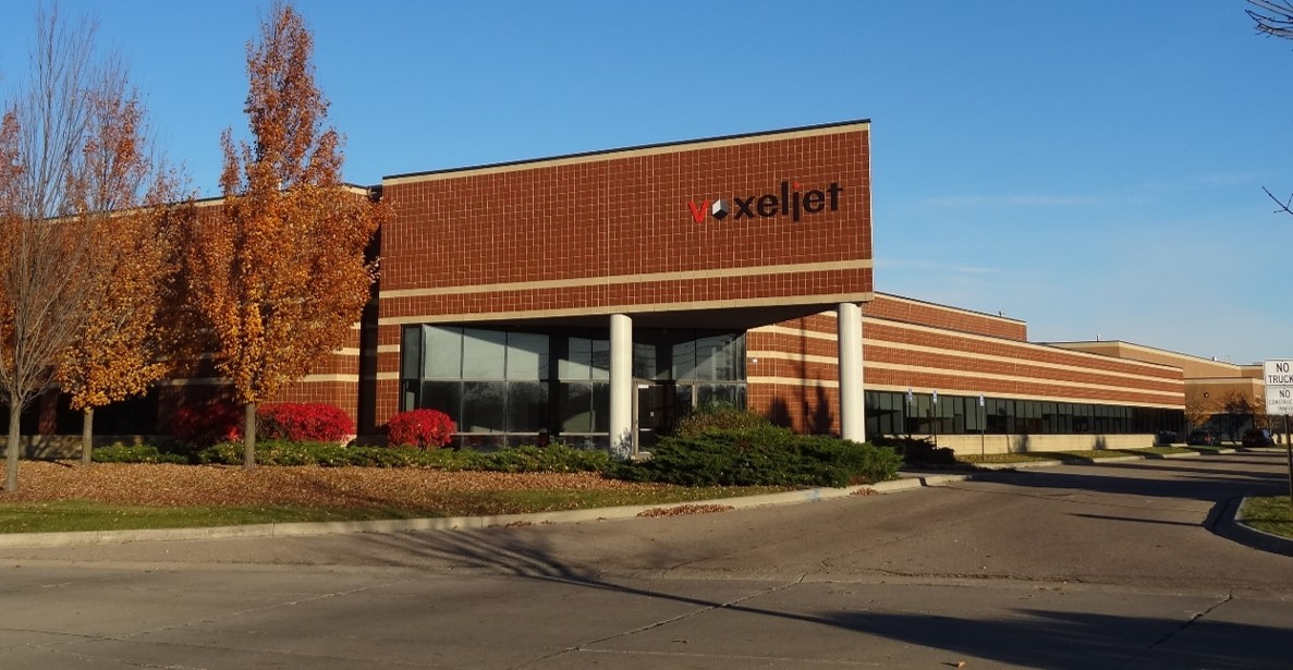 voxeljet Standort in Canton, Michigan